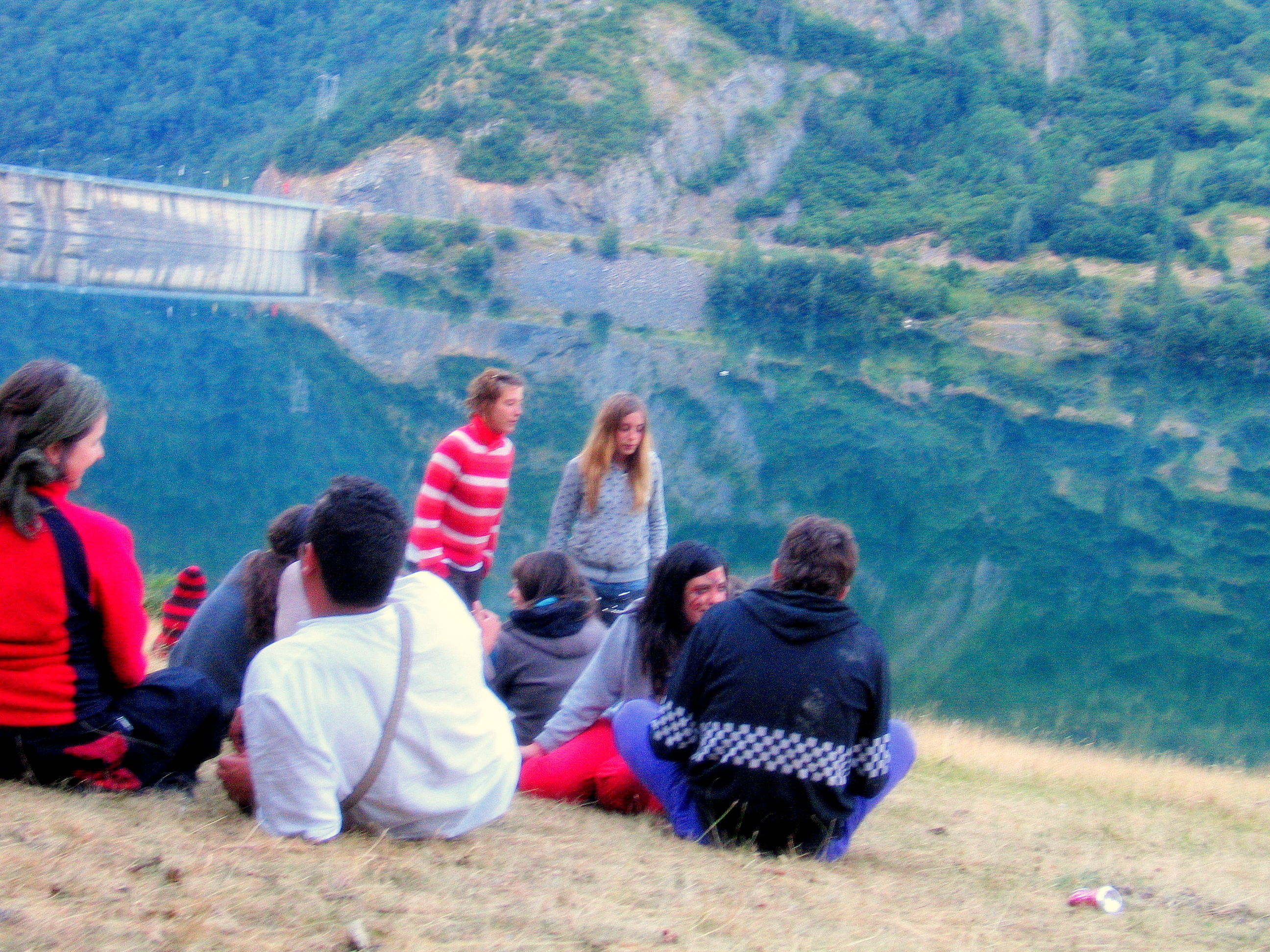 Embalse de Lanuza, Pirineos Sur